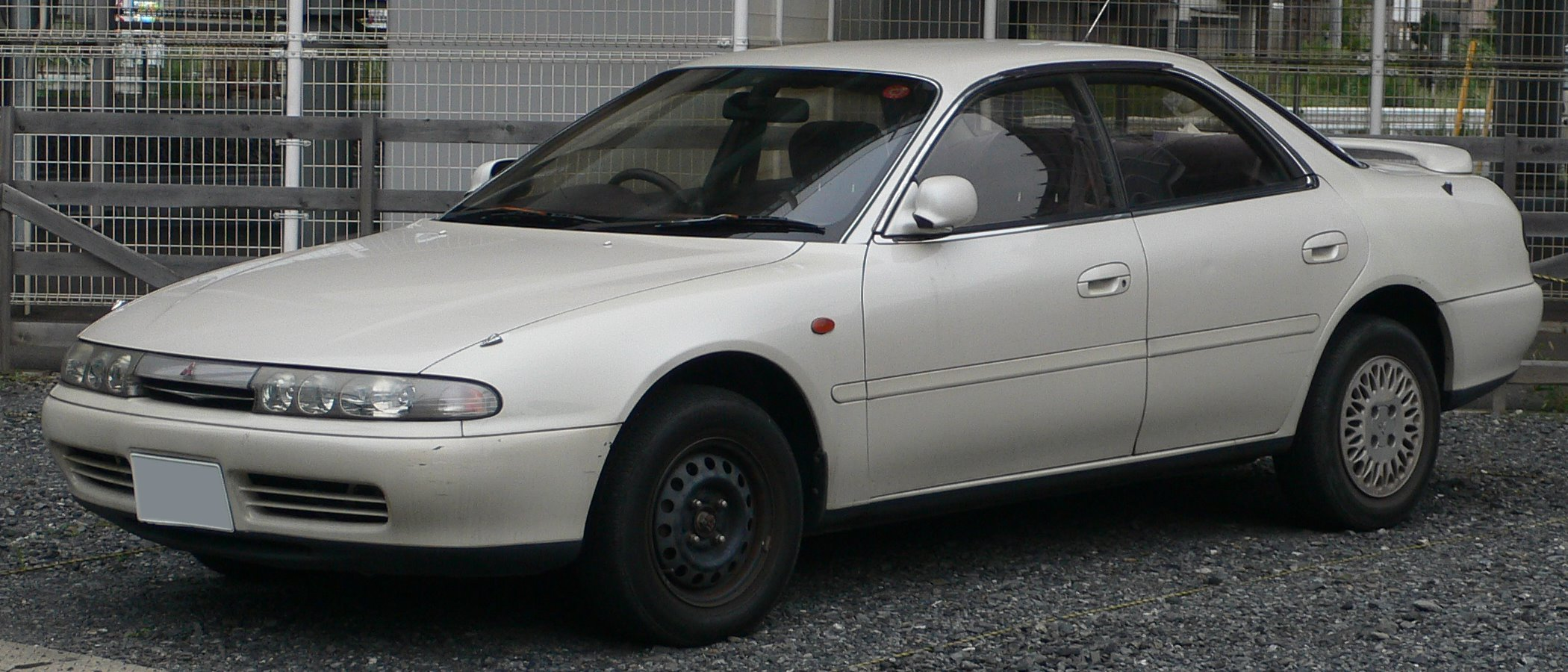 Mitsubishi_Emeraude (1992 - 1994)